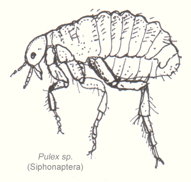 Siphonaptera - Pulicidae - Pulex sp.